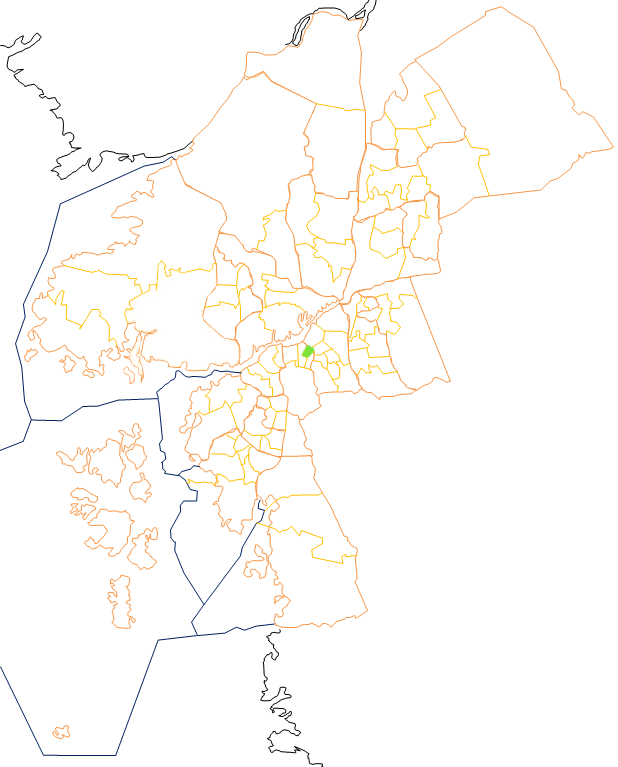 Karta som visar primärområdes belägenhet i Göteborg